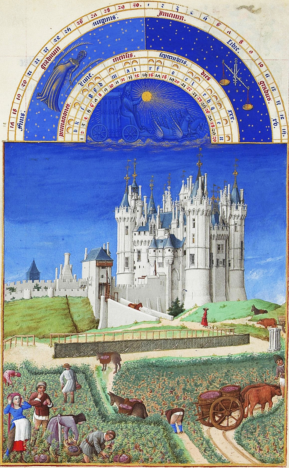 September, Les Très Riches Heures du duc de Berry (corr. vers.)